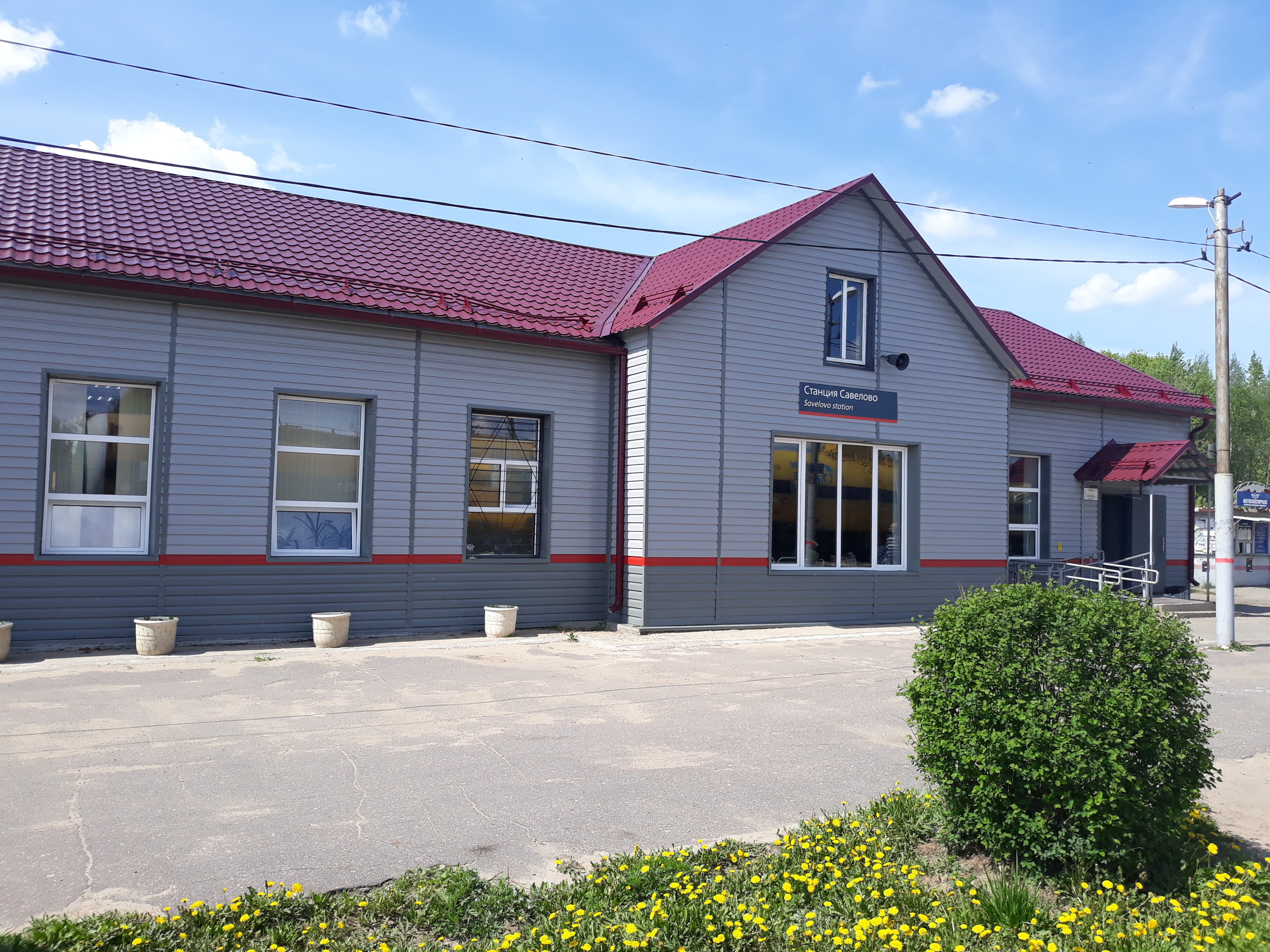 Вокзальное здание станции «Савёлово»